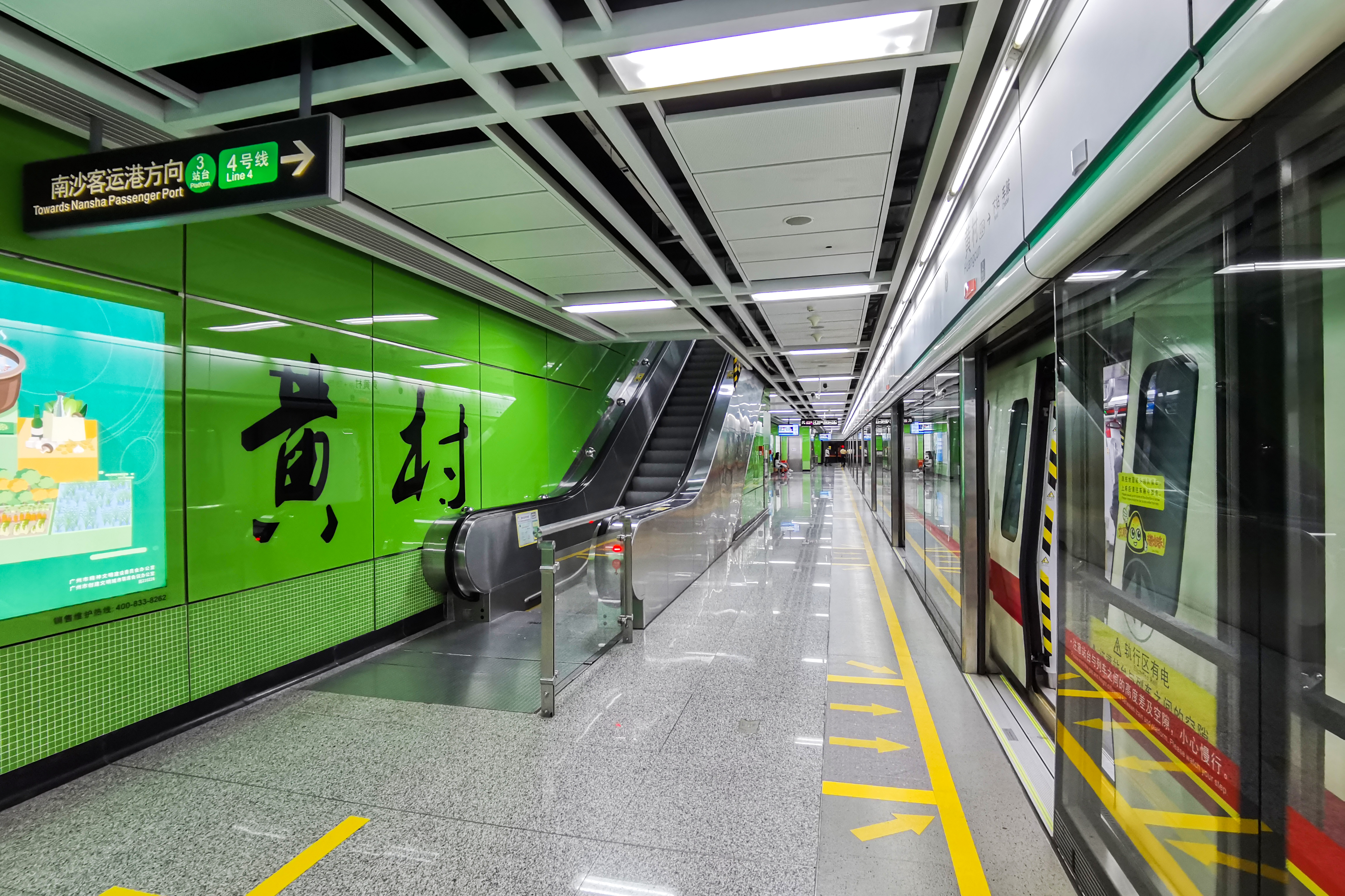 广州地铁黄村站